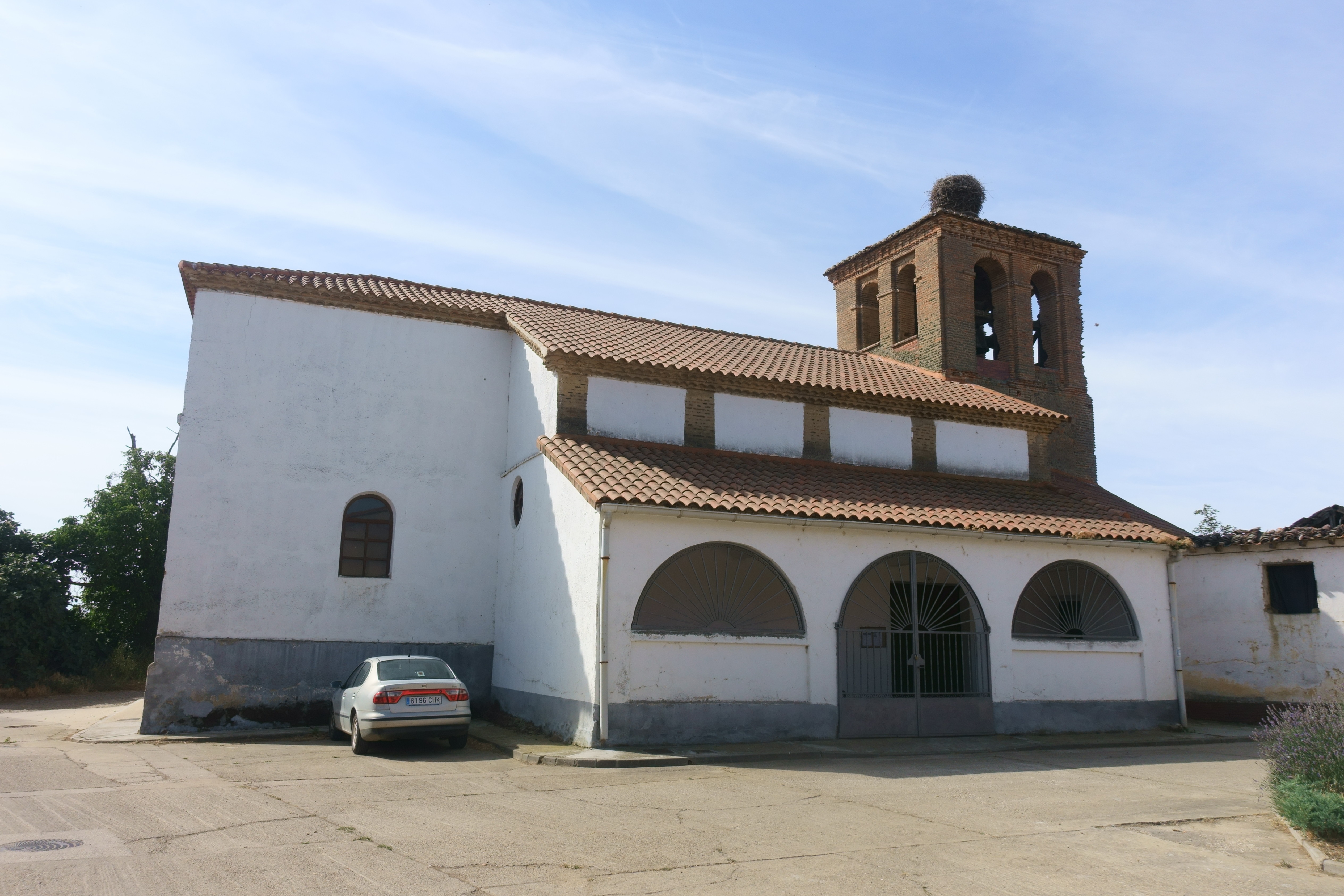 Iglesia de San Martín, Pedrosa de la Vega (Palencia, España).